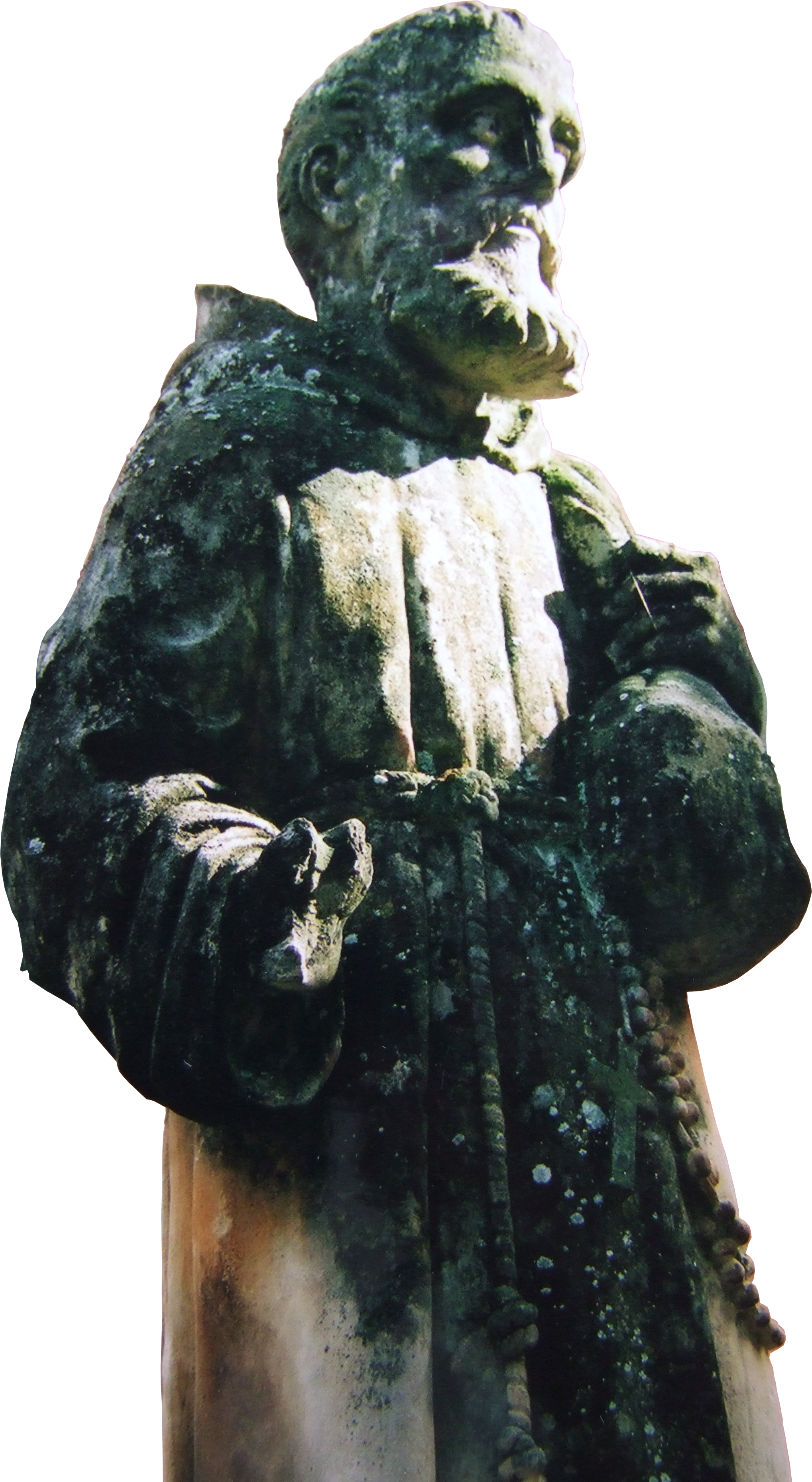 Statue de Saint Félix de Cantalice, détourée.